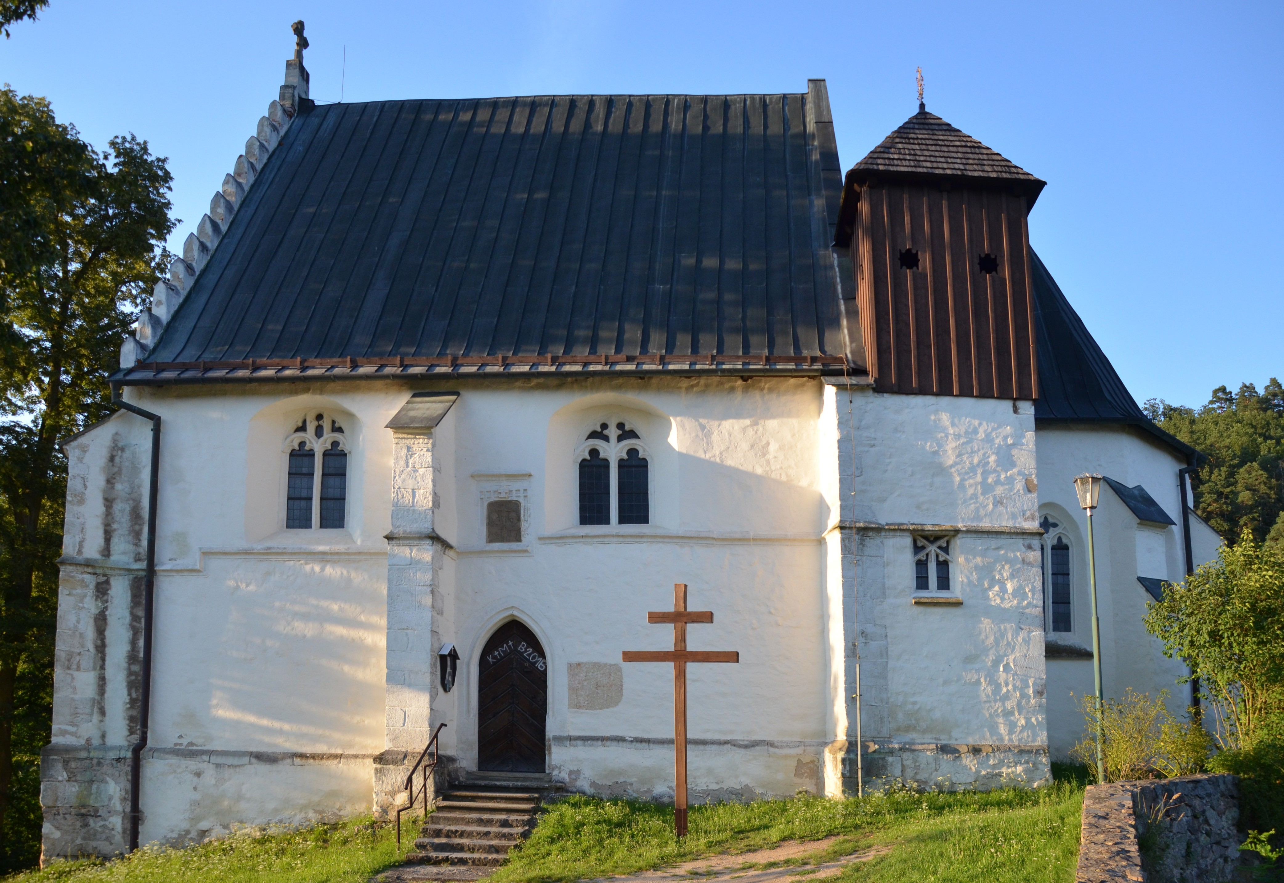 Kostel svaté Kateřiny v Šebrově-Kateřině